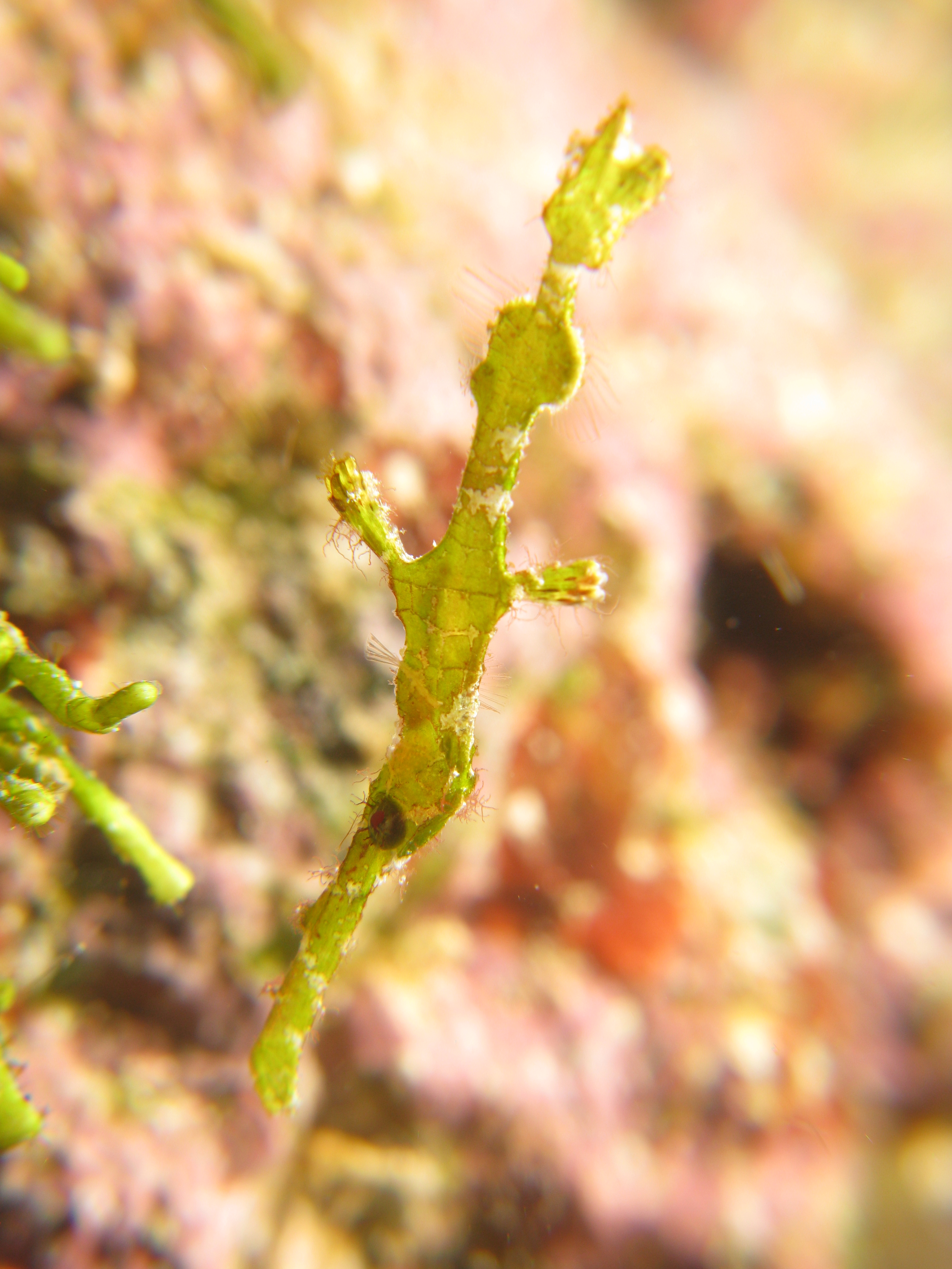 Halimeda Ghostpipefish - Solenostomus halimeda